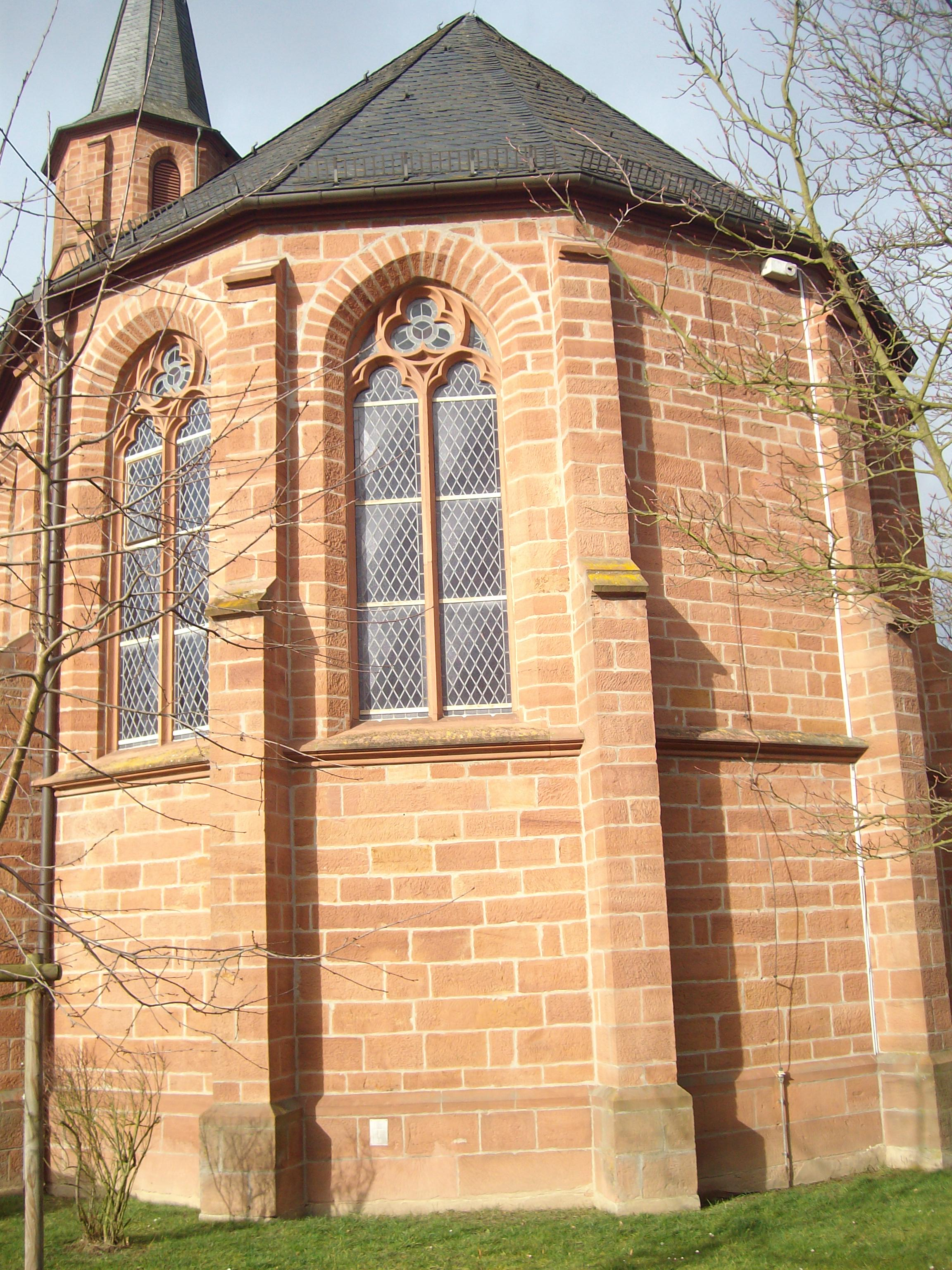 Evangelische Kirche Kinzenbach, Heuchelheim, Hessen, Deutschland